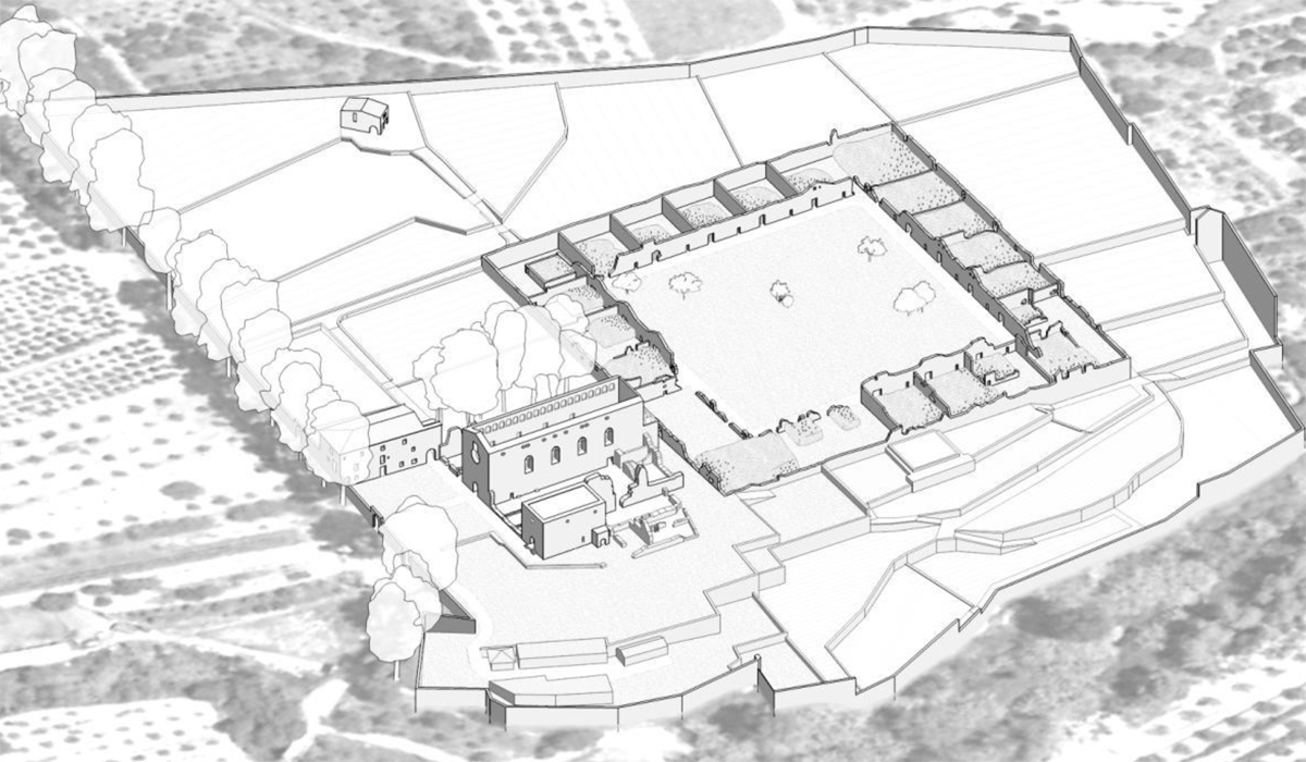 Axonometría en 2012 de la Cartuja de Valldecrist, en la localidad de Altura, provincia de Castellón.